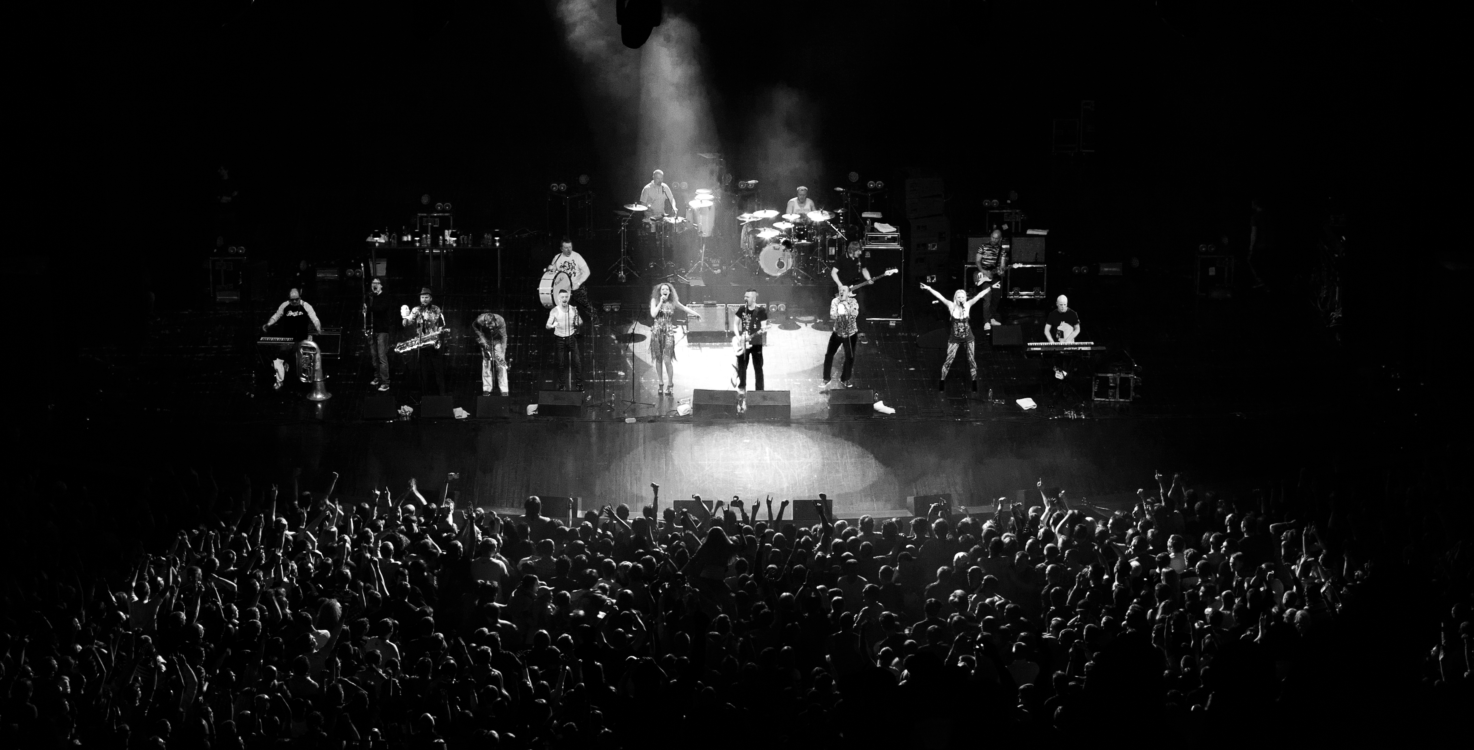 Группировка Ленинград в Москве. Работа - Кирилл Назипов (Reactor691). Концертный зал - Крокус Сити Холл.